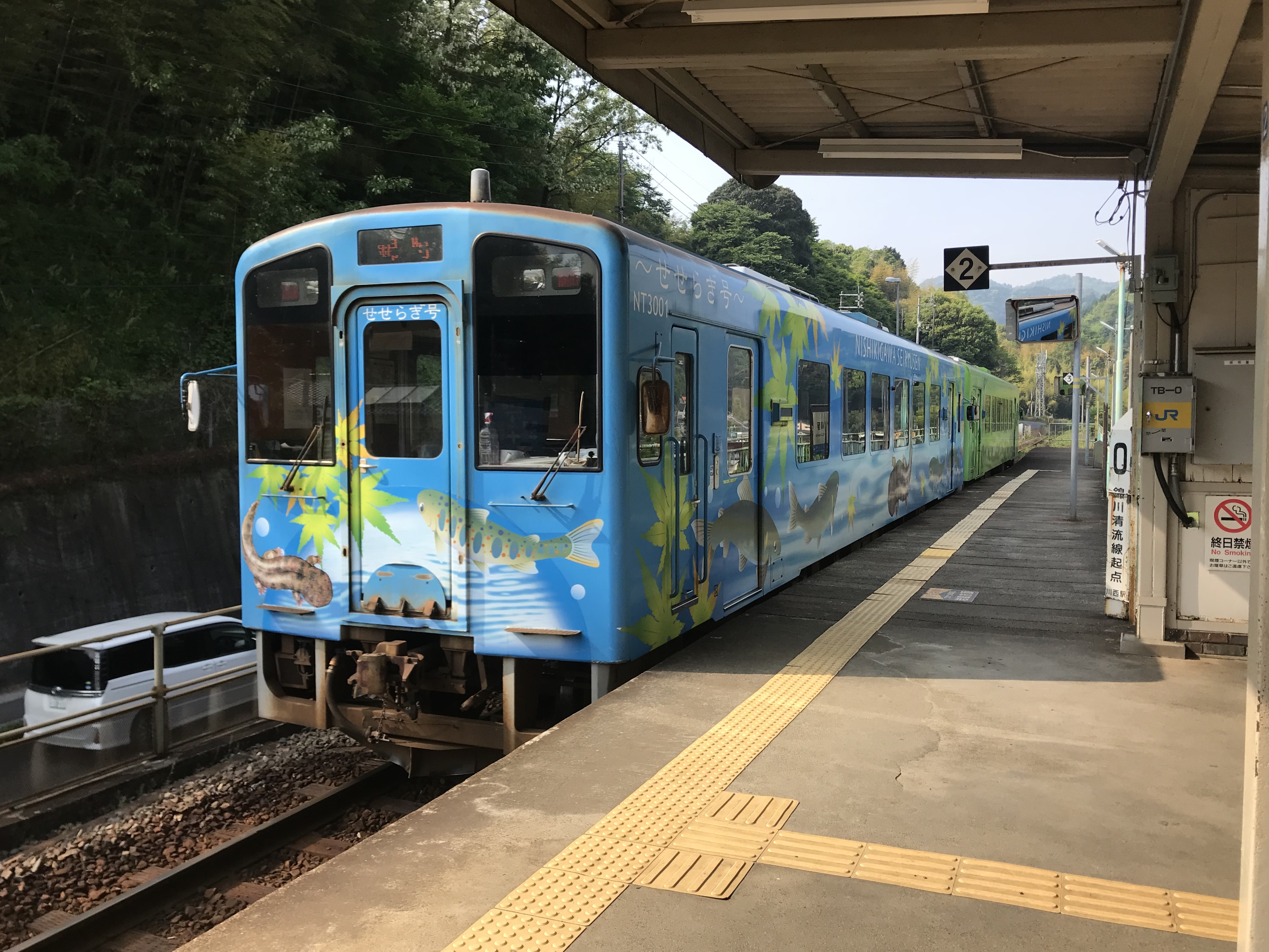 川西駅に停車中の錦町行き錦川清流線列車